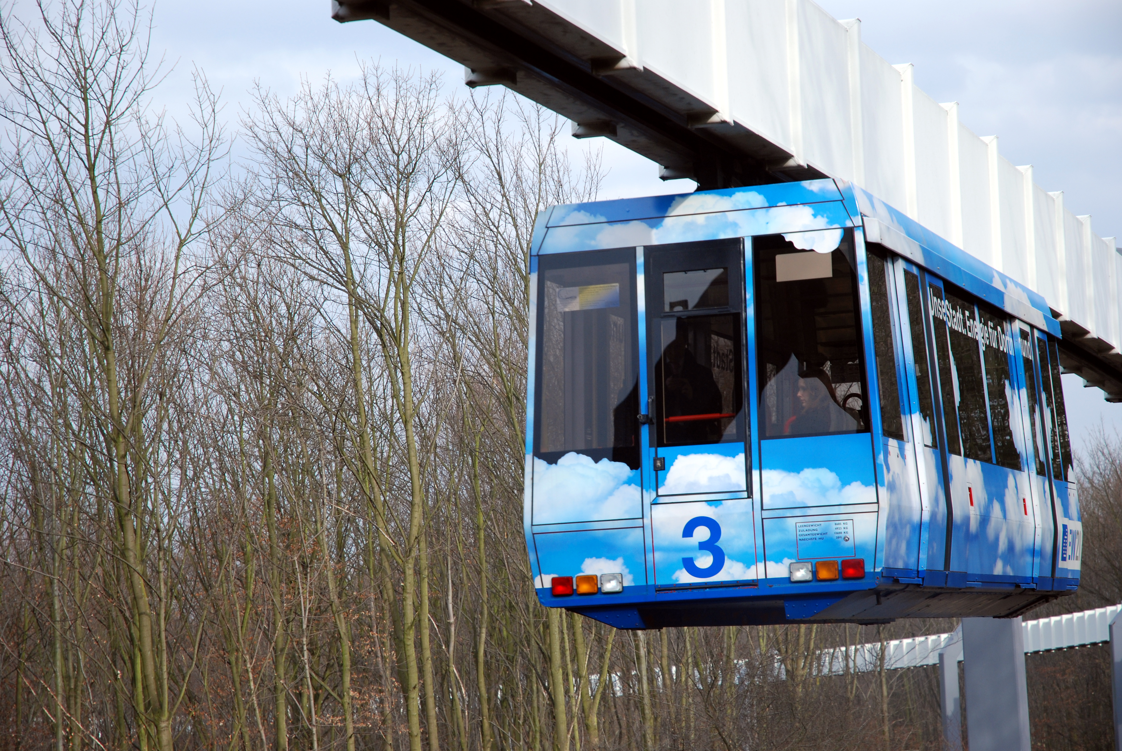 Dortmund-Eichlinghofen, TU Dortmund, Campus Süd, H-Bahn